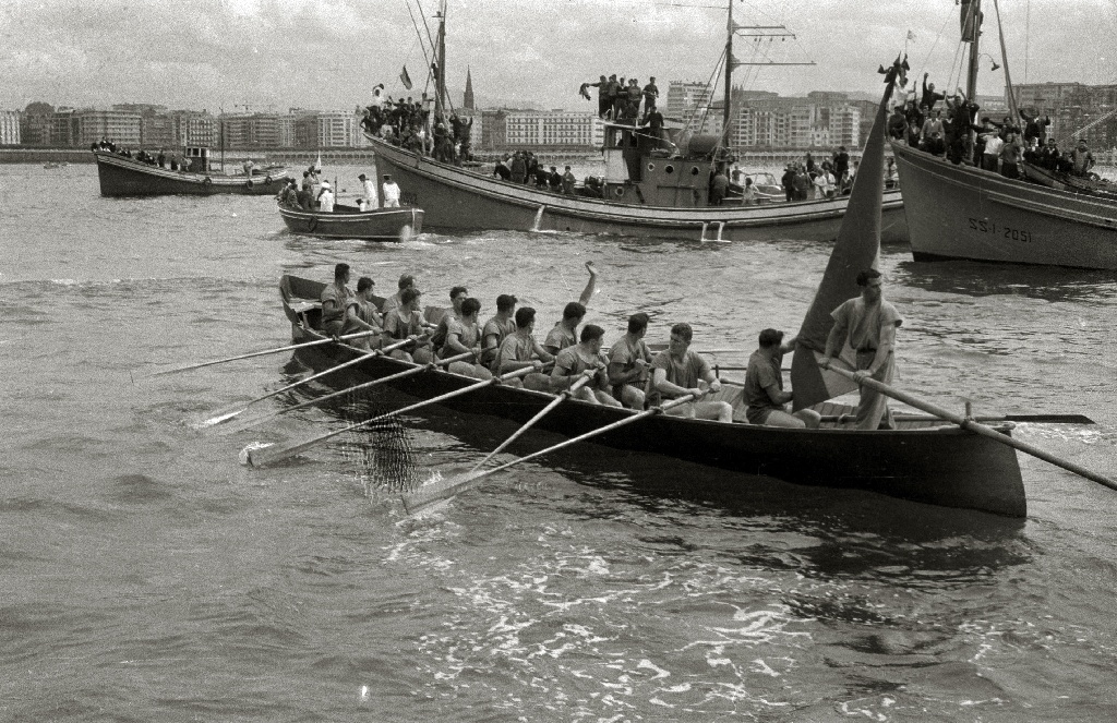 Título original: Regatas de traineras en la bahía de la Concha (54/127) Localización: San Sebastián (Guipúzcoa)